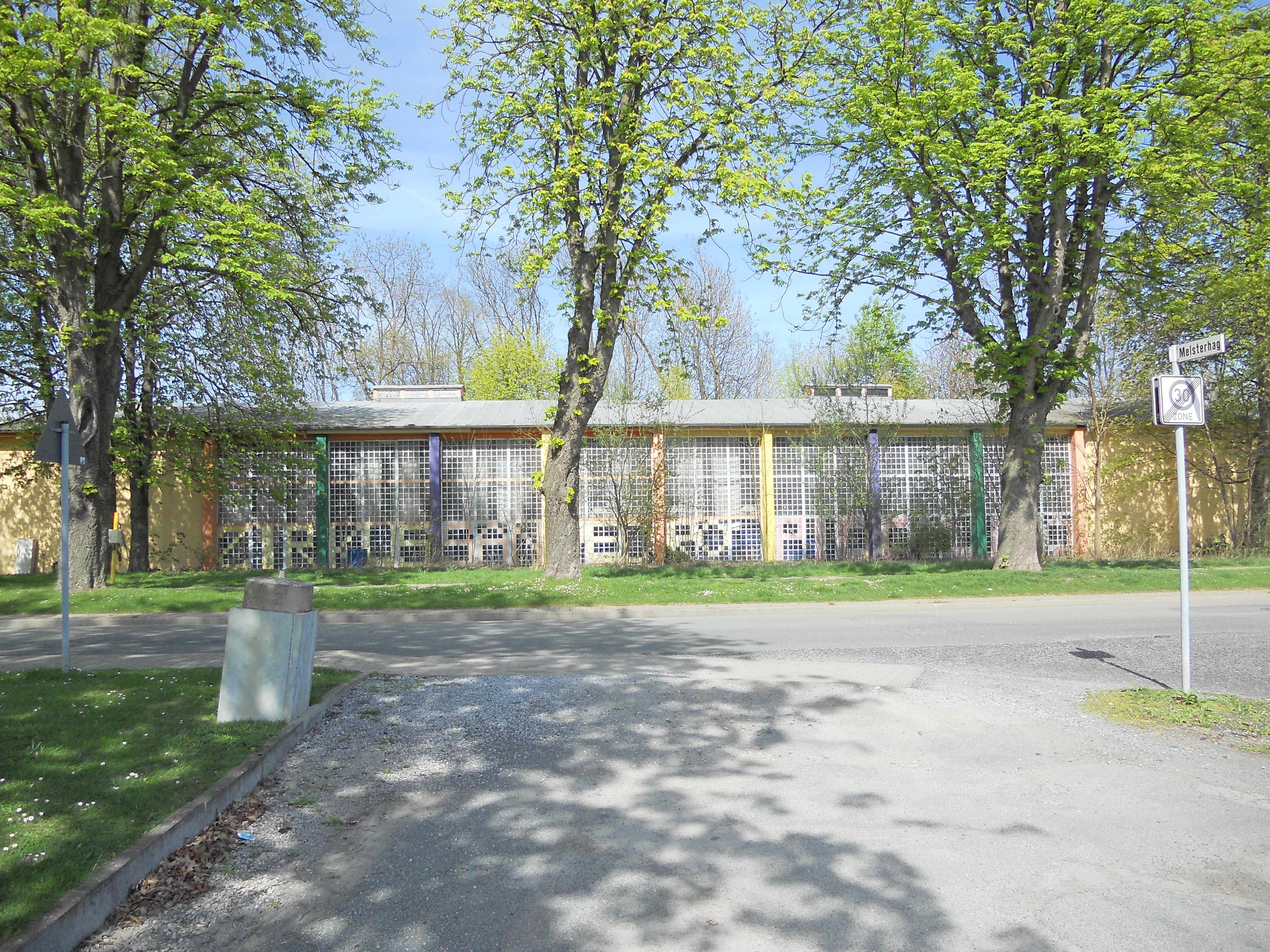 Kon-Werl Gelände, Halle des Kinderzirkus Pedro Piccolini